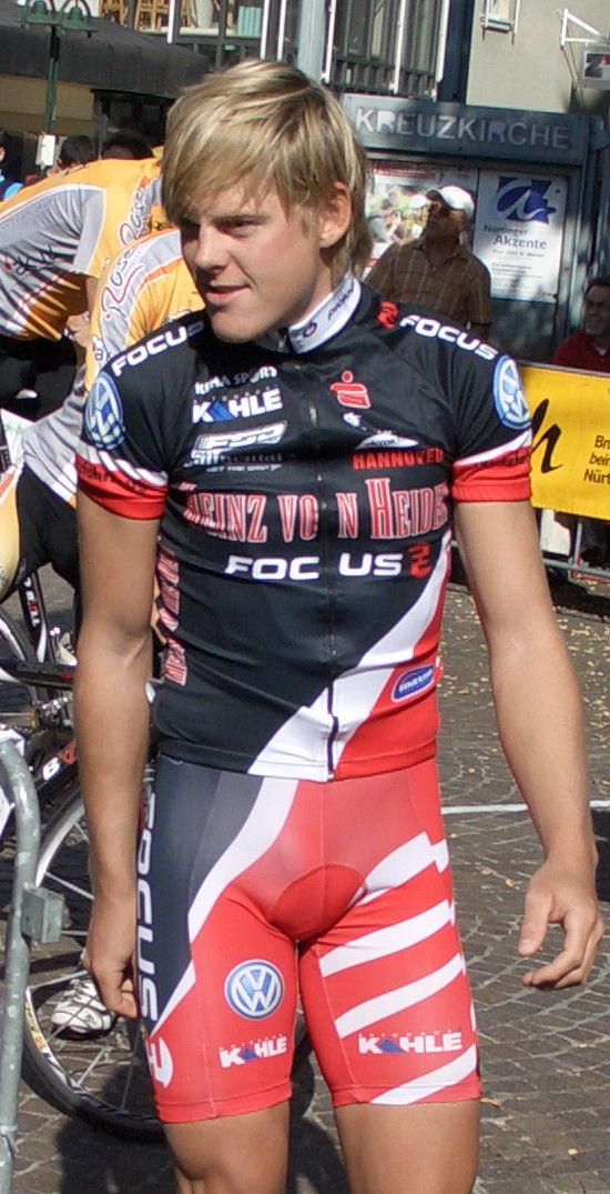 Richard Geng